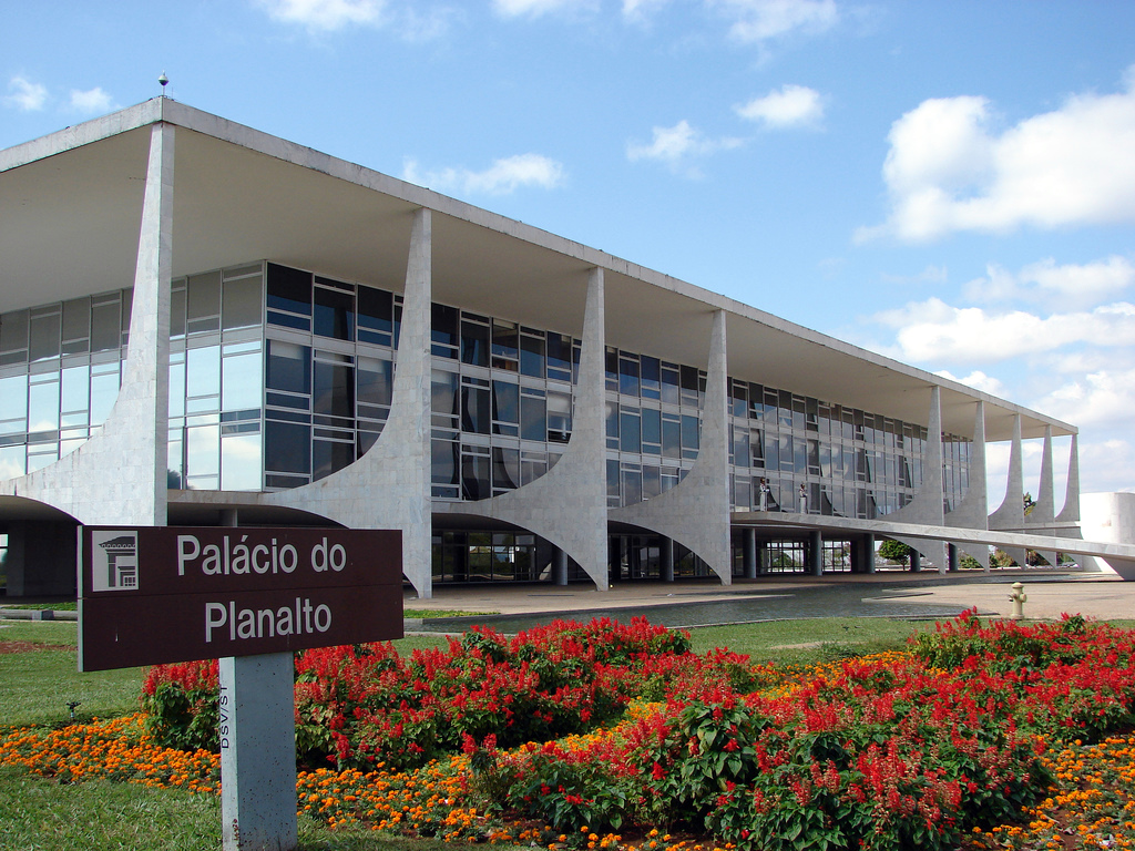 Palácio do Planalto, Brasília. Camera: Sony DSC-H2 License on Flickr (2010-12-27): CC-BY-SA-2.0